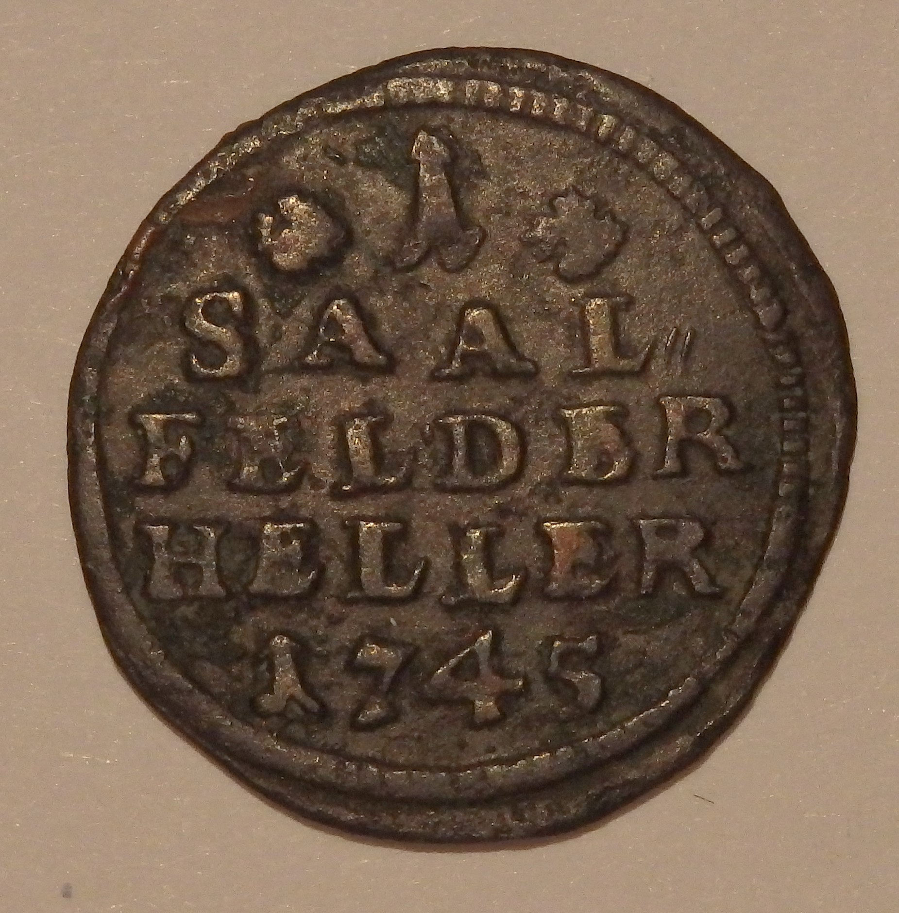 Heller, Sachsen-Coburg-Saalfeld, Jahr 1745, Gerhard Schön, Deutscher Münzkatalog 18. Jahrhundert, Nr. 1